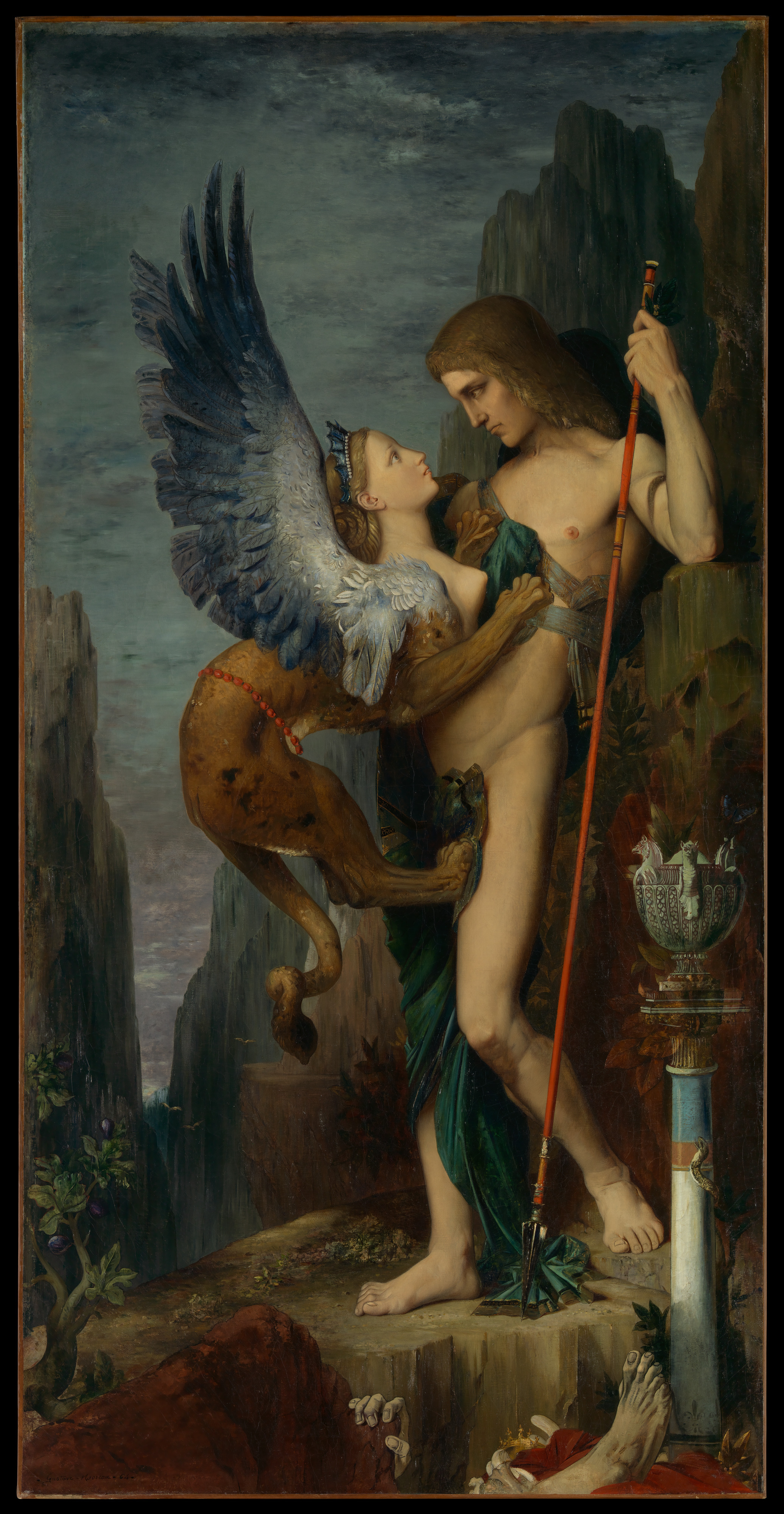 Painting; Paintings